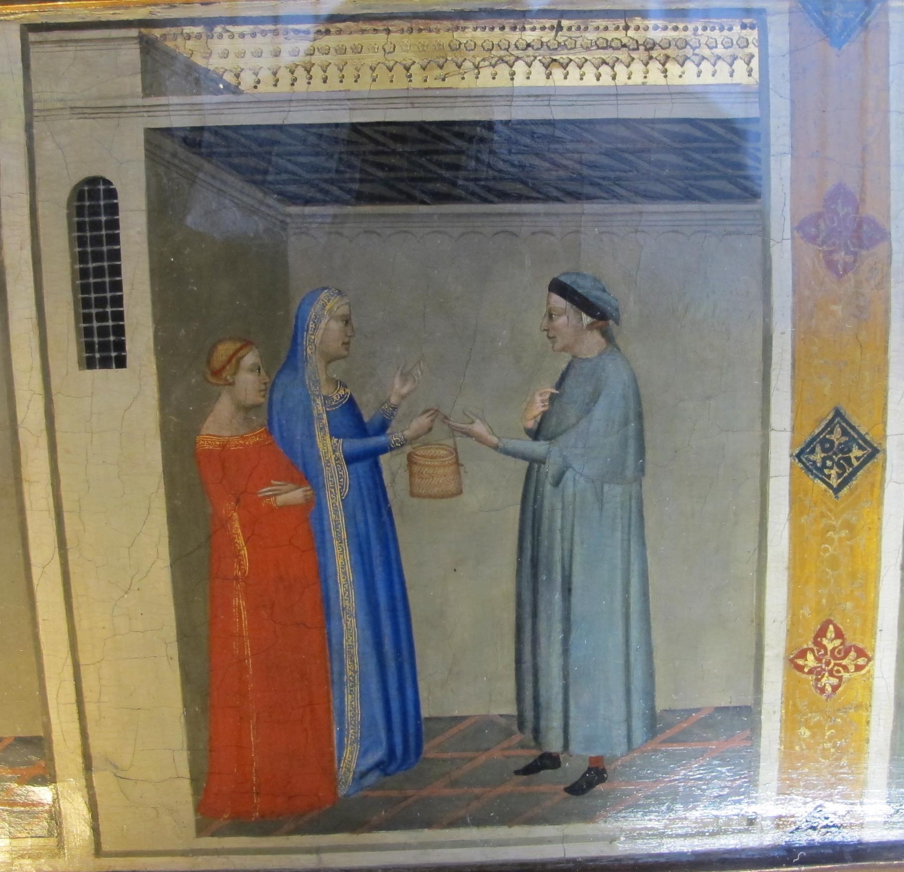 Bernardo daddi, predella con storie della cintola, 1337-1338, da duomo di prato